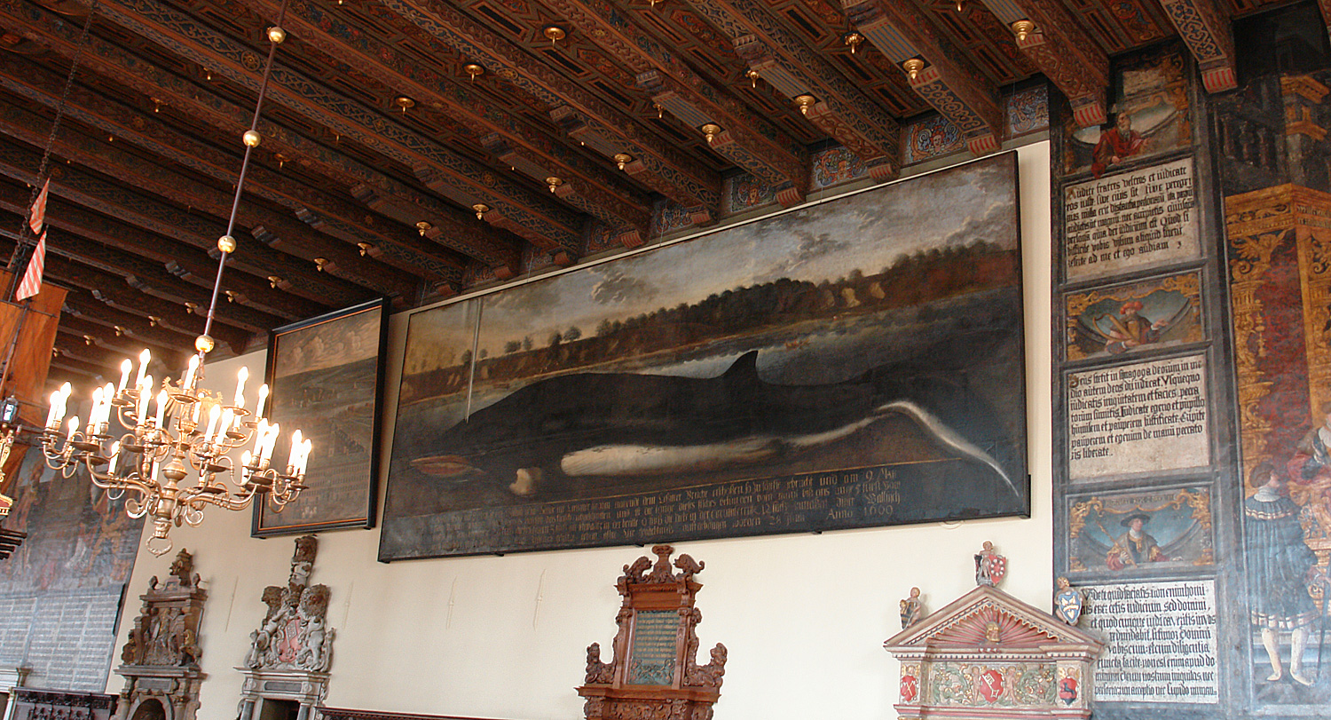 Ölgemälde Großes Walbild von Franz Wulfhagen (1624–1670) aus dem Jahr 1669. Standort: Obere Halle des Bremer Rathauses. Das Bild zeigt einen Nördlichen Zwergwal (Balaenoptera acutorostrata), der 1669 am Ufer der Lesum gestrandet war und von Bremer Walfängern erlegt wurde.